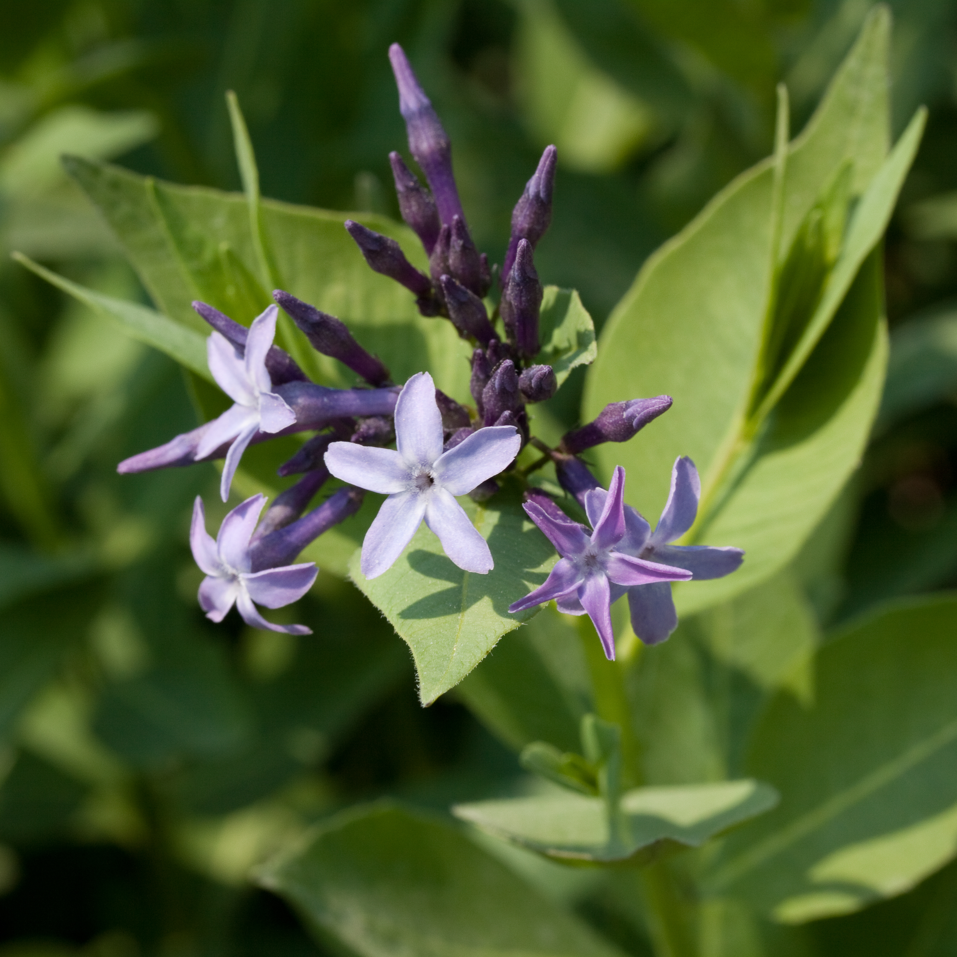 Fleurs de Rhazya orientalis - Jardin des Plantes - Paris